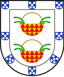 escudo de el marquesado de la torre de las sirgadas